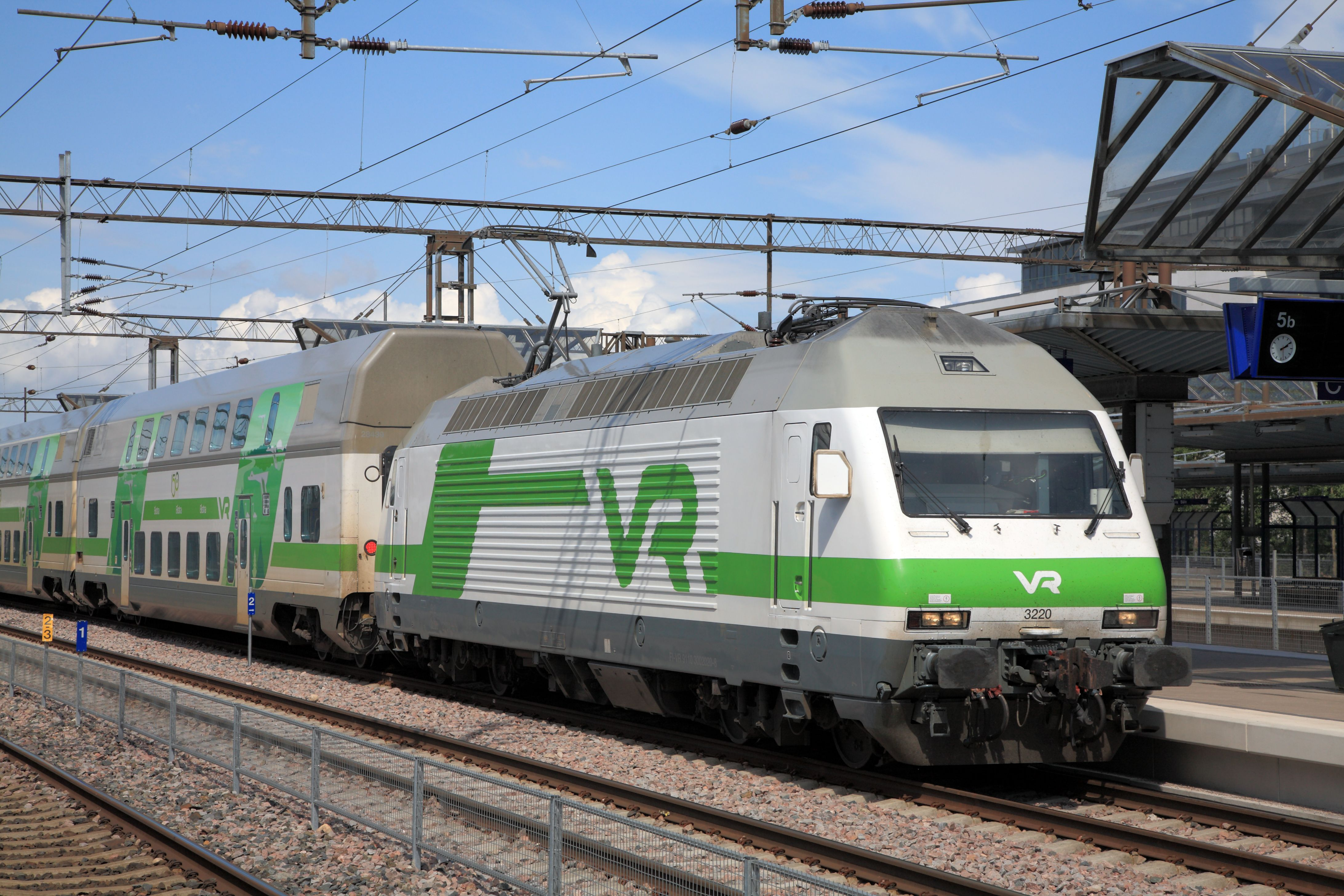 IC2-Doppelstockzug nach Helsinki Hbf bei der Fahrt durch den letzten Bahnhof Pasila/Böle